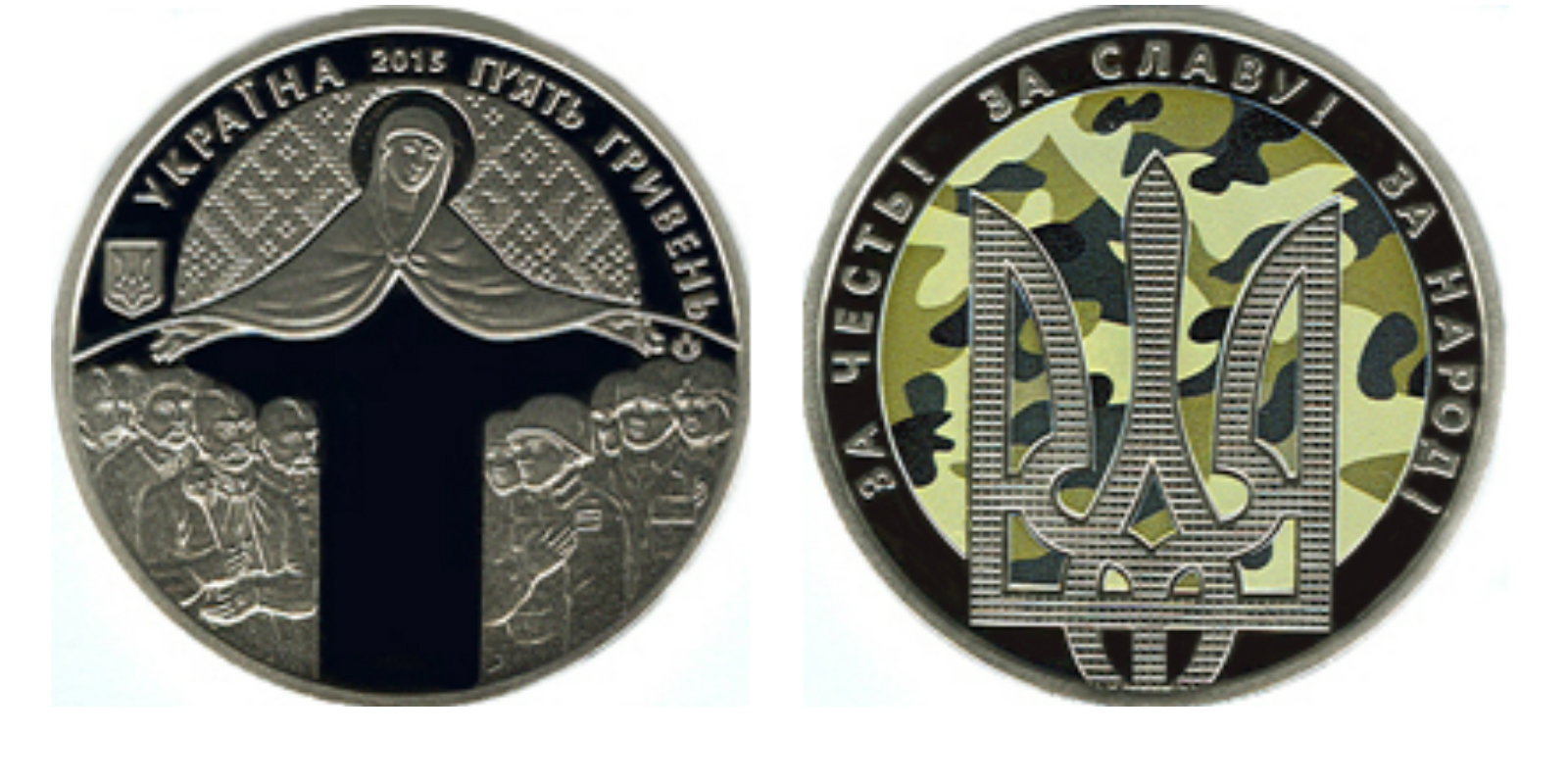 Памятная монета "Дня защитника Украины"